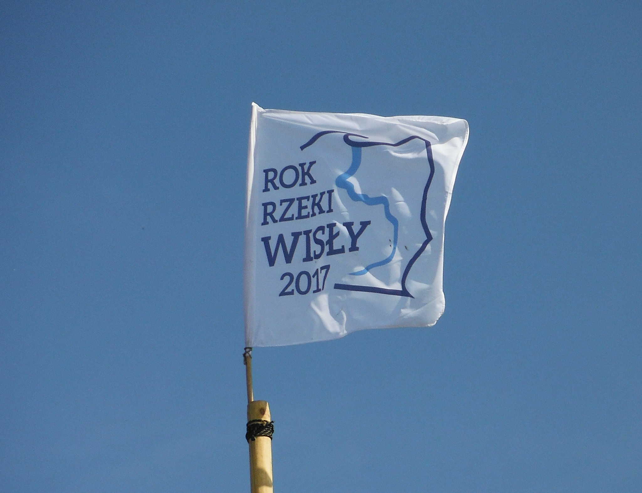 Flaga Roku Rzeki Wisły podczas Flis Festiwalu w Gassach w 2017 roku.